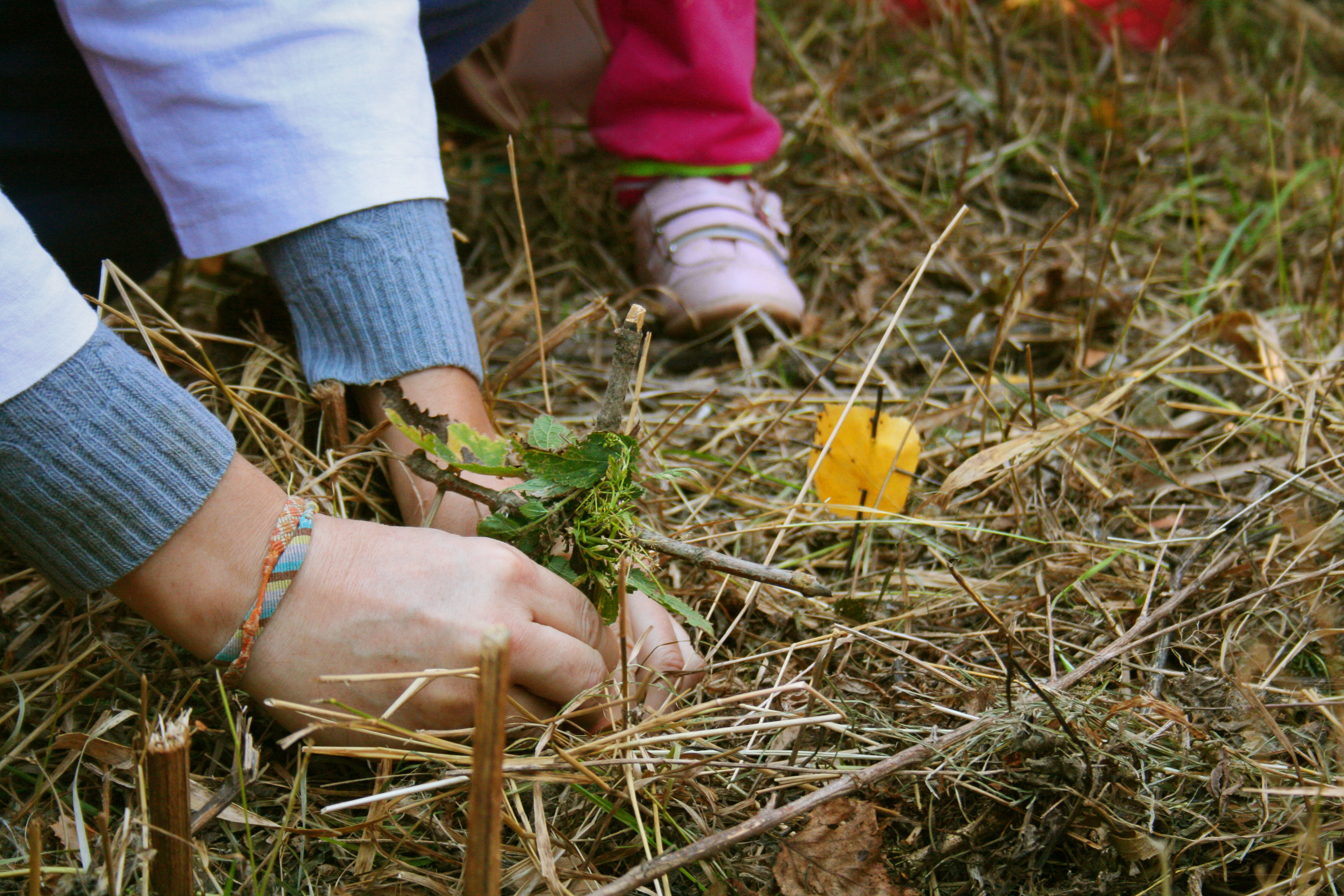 «Могила мухи». Обряд «Похороны мух». Праздник встречи осени (Осенины) в родовом экопоселении «Кореньские родники». Белгородская область, 2014.